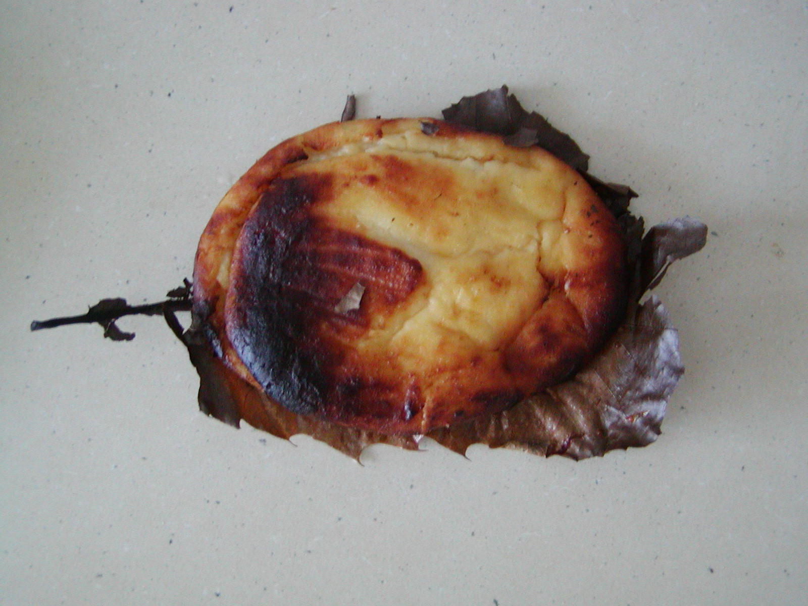 Falculella from Corsica